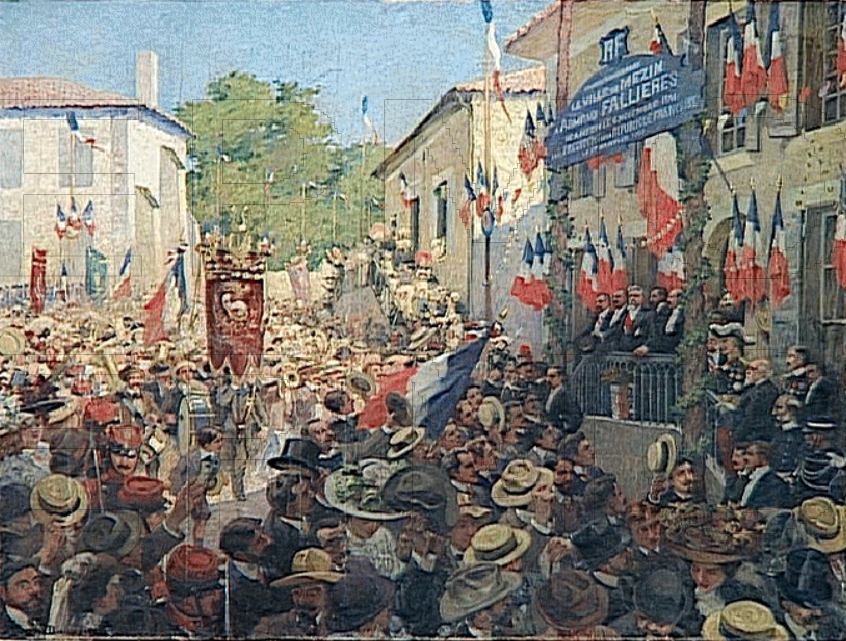 Le président Fallières acclamé par ses compatriotes, Fête de Mézin, 3 octobre 1906. Réception d'Armand Fallières, président de la République française de février 1906 à 1913, à Mézin, sa ville natale